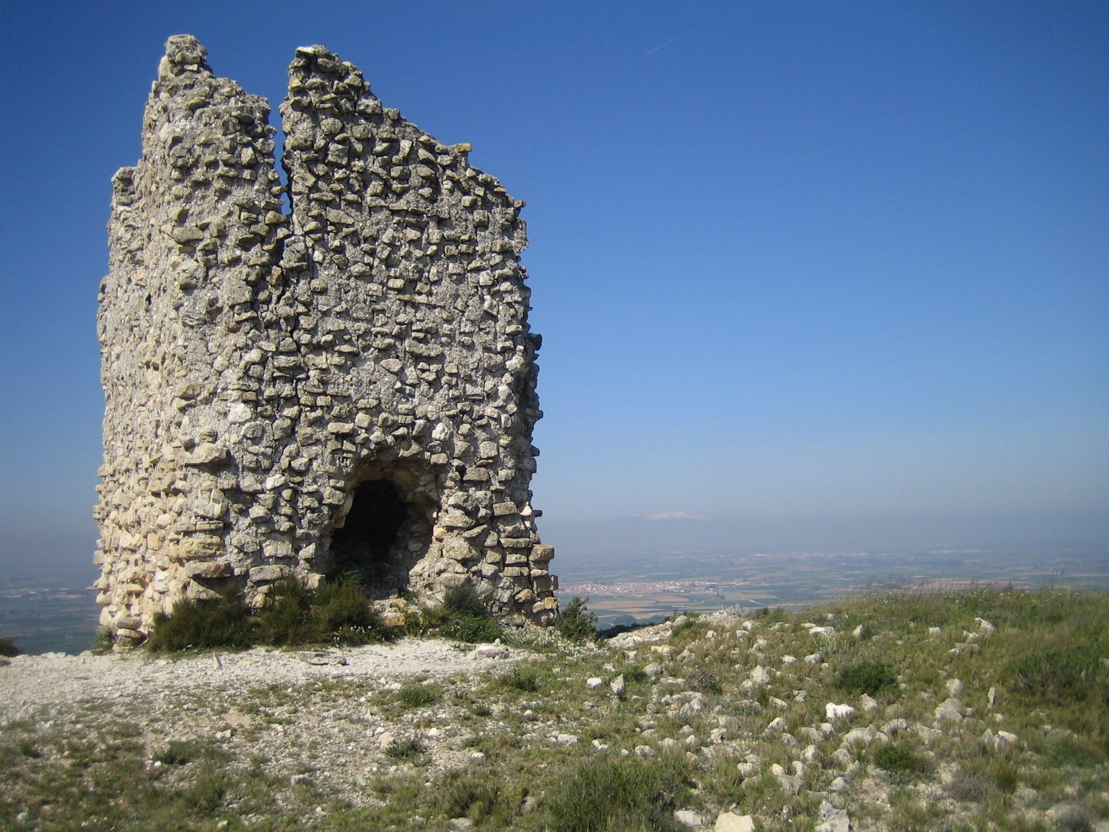 Almenara de Candespina (Sobradiel, Zaragoza) antes de derrumbarse la fachada Norte en 2013.